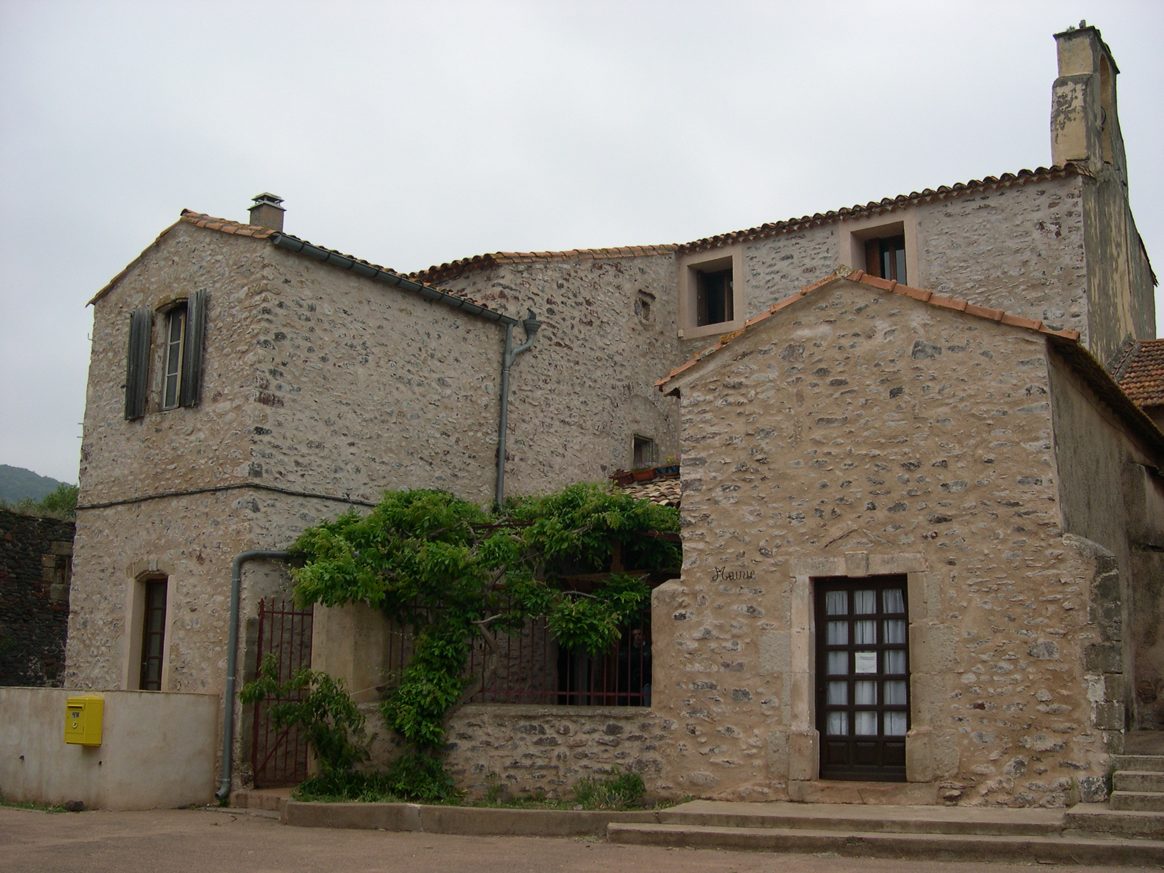 Celles (Hérault) - mairie.